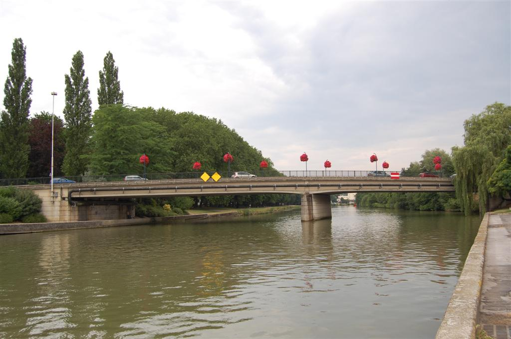 Verkeersbrug over de Aisne in Soissons